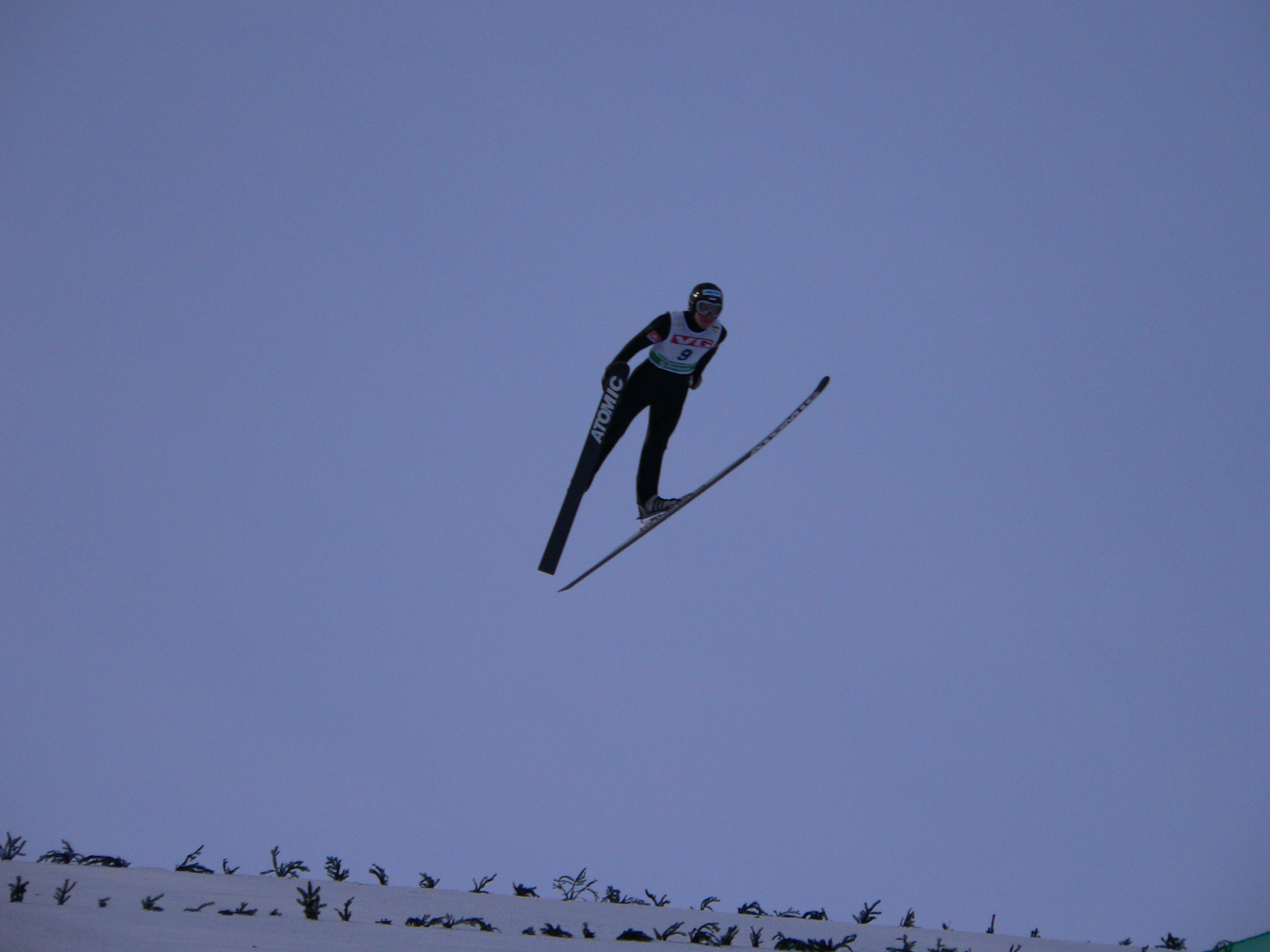 Jens Salumae, Holmenkollen, 2005